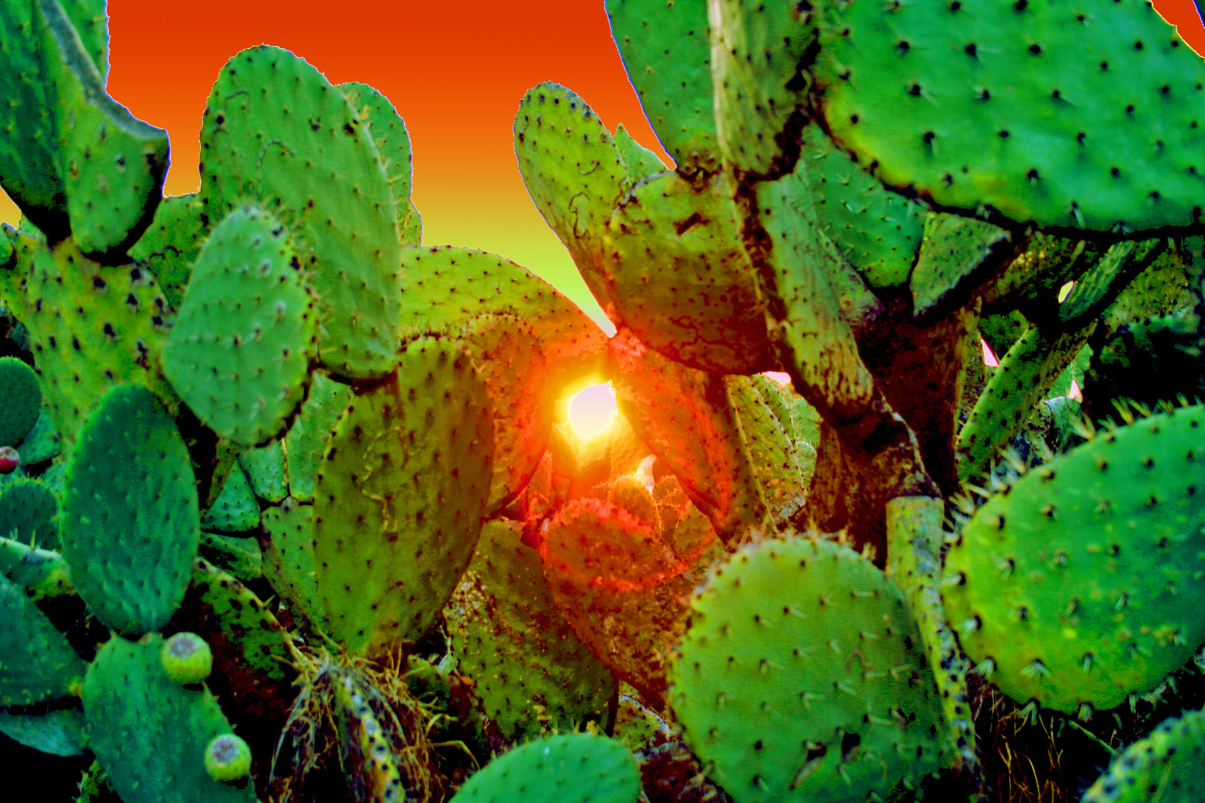 San Martín de las Pirámides, Estado de México